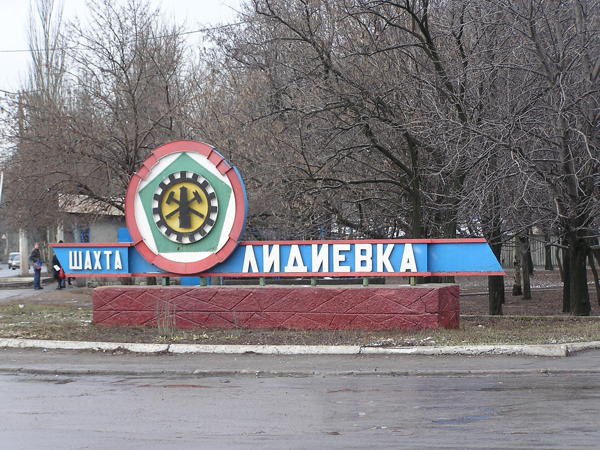 Донецк. Шахта Лидиевка